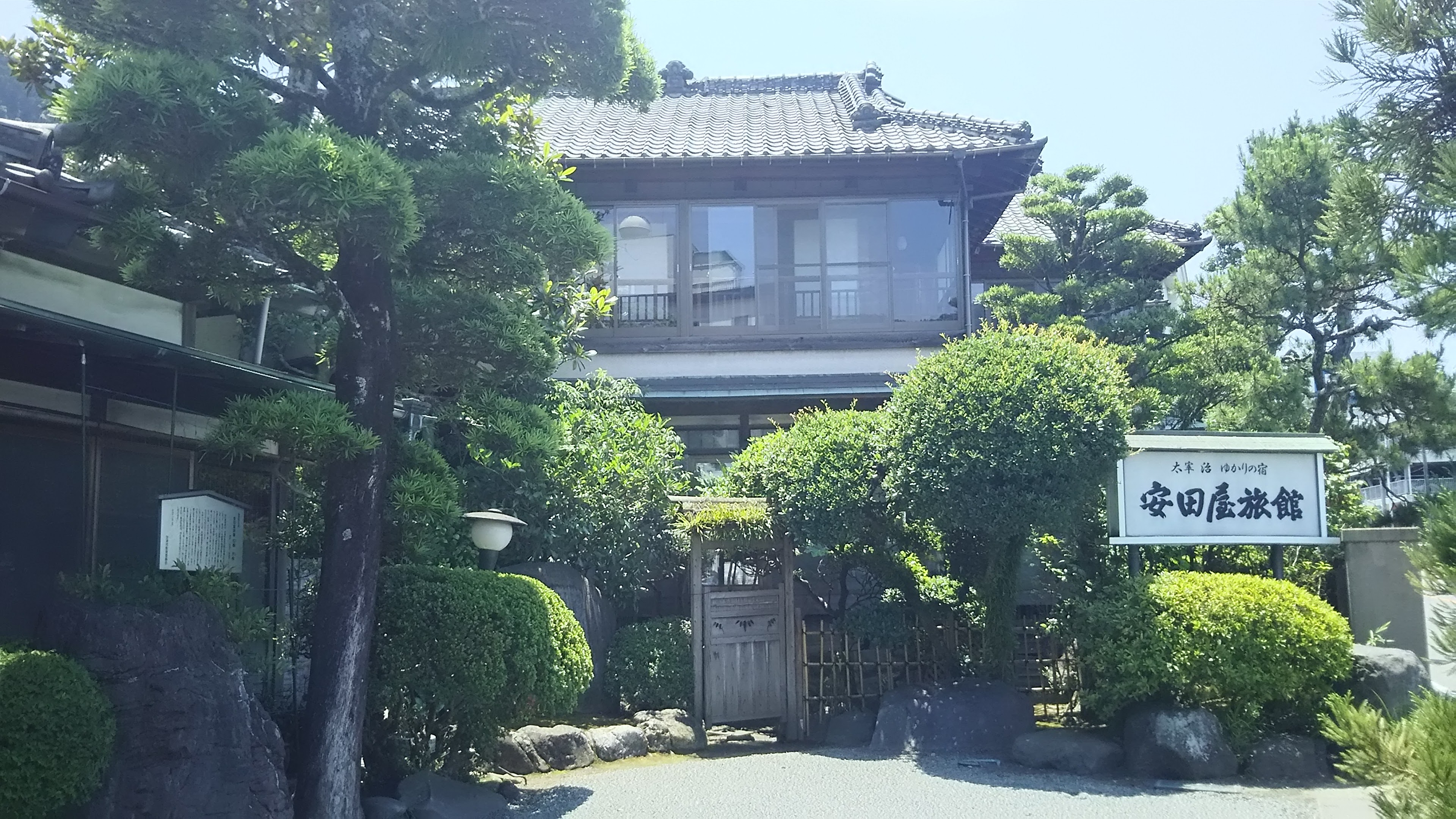 静岡県沼津市にある国登録有形文化財、安田屋旅館外観。